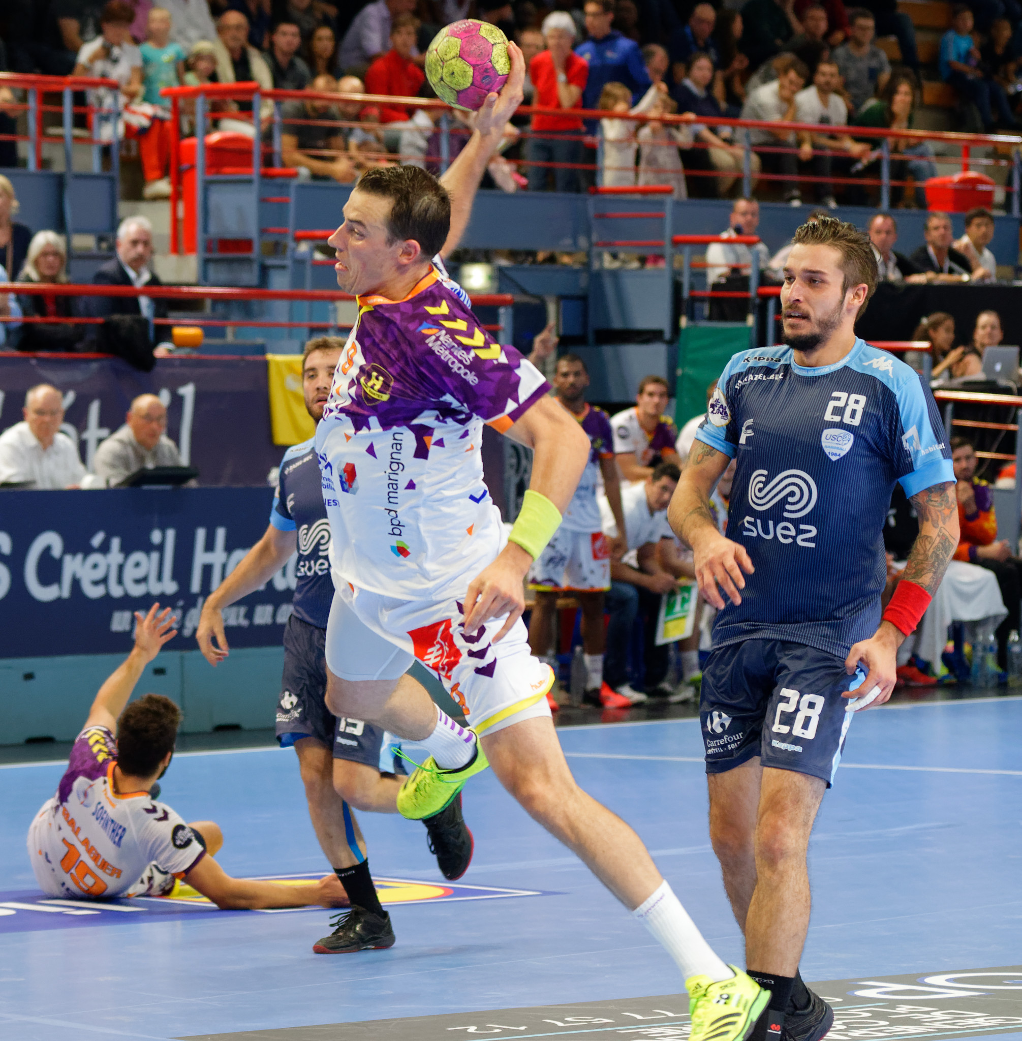 Rencontre de championnat de LidlStarLigue entre l'US Créteil et le HBC Nantes. A Créteil, le 25 septembre 2016.